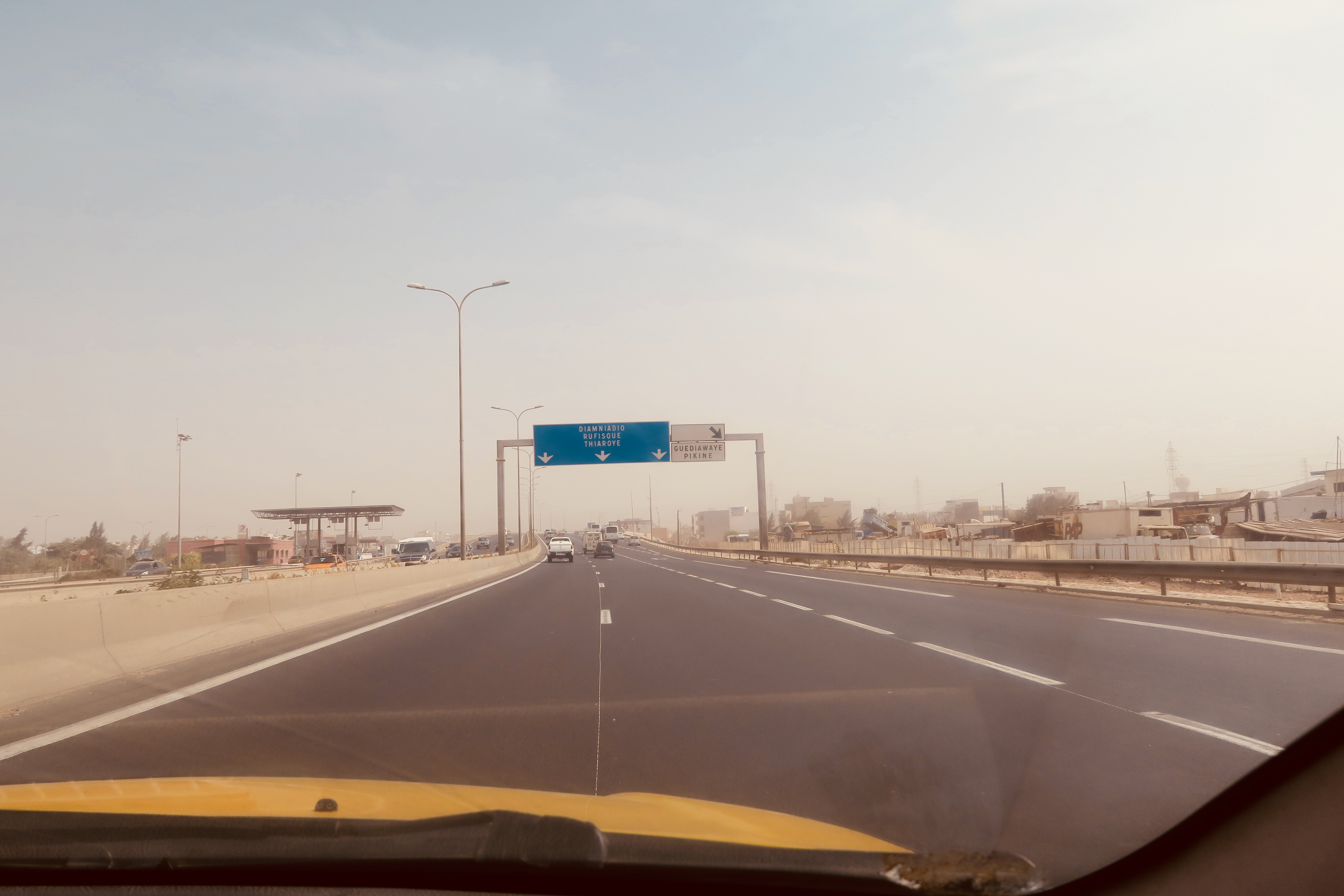 Autoroute A1 - en direction de l'aéroport